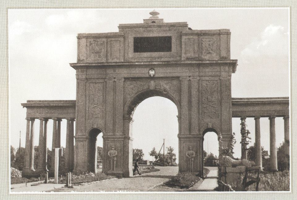 Беларуская (тарашкевіца): Маладэчна (Maładečna), Гелянова (Hielanova). Трыюмфальная брама